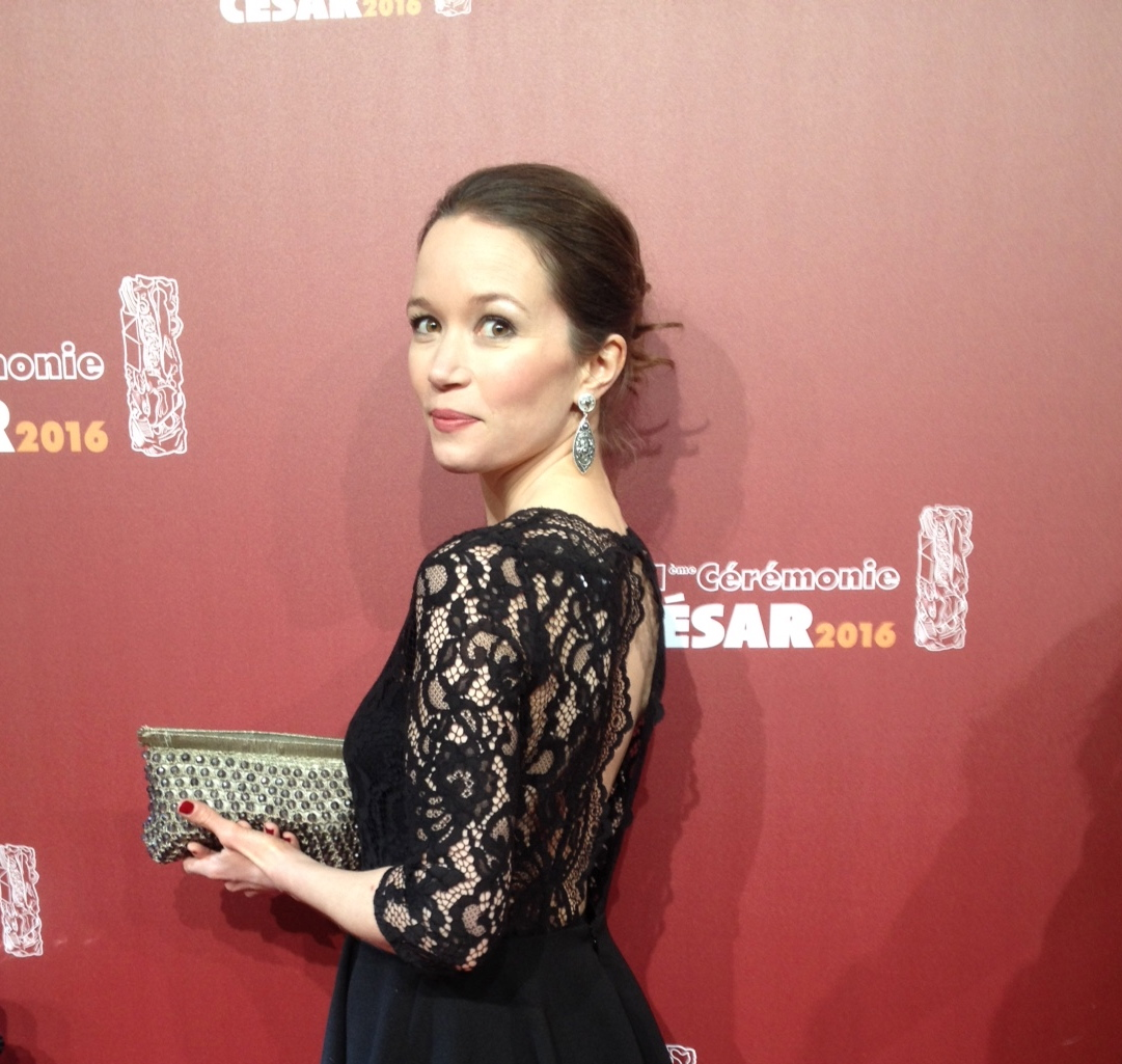 Chloé Stefani à la 41e Cérémonie des César